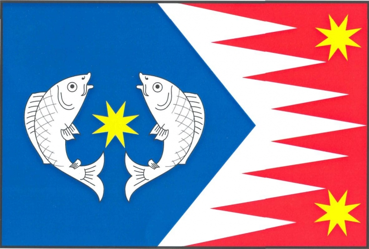 Vlajka, Sádek, okres Svitavy